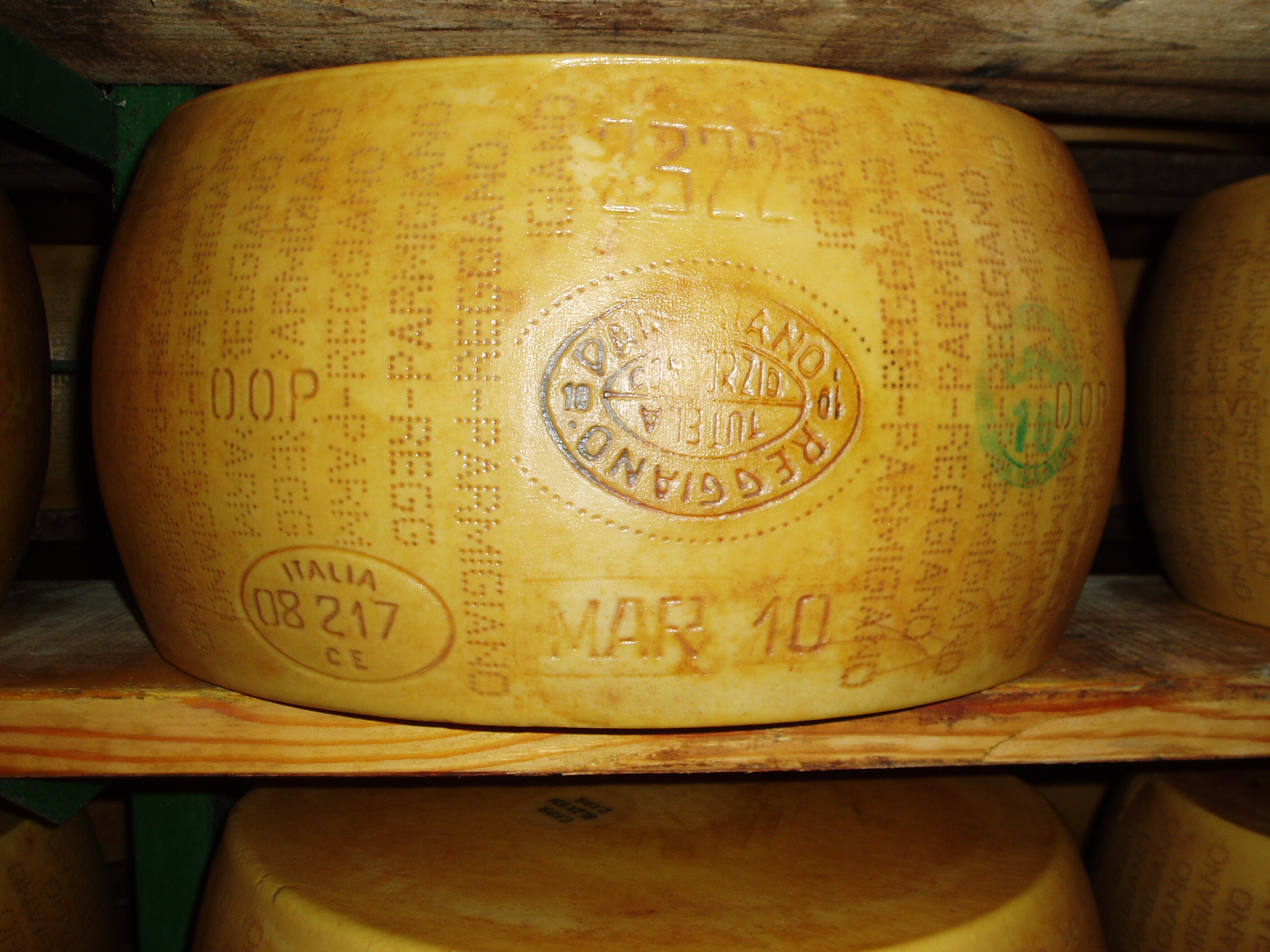 Parmigiano-Reggiano, cheese producing